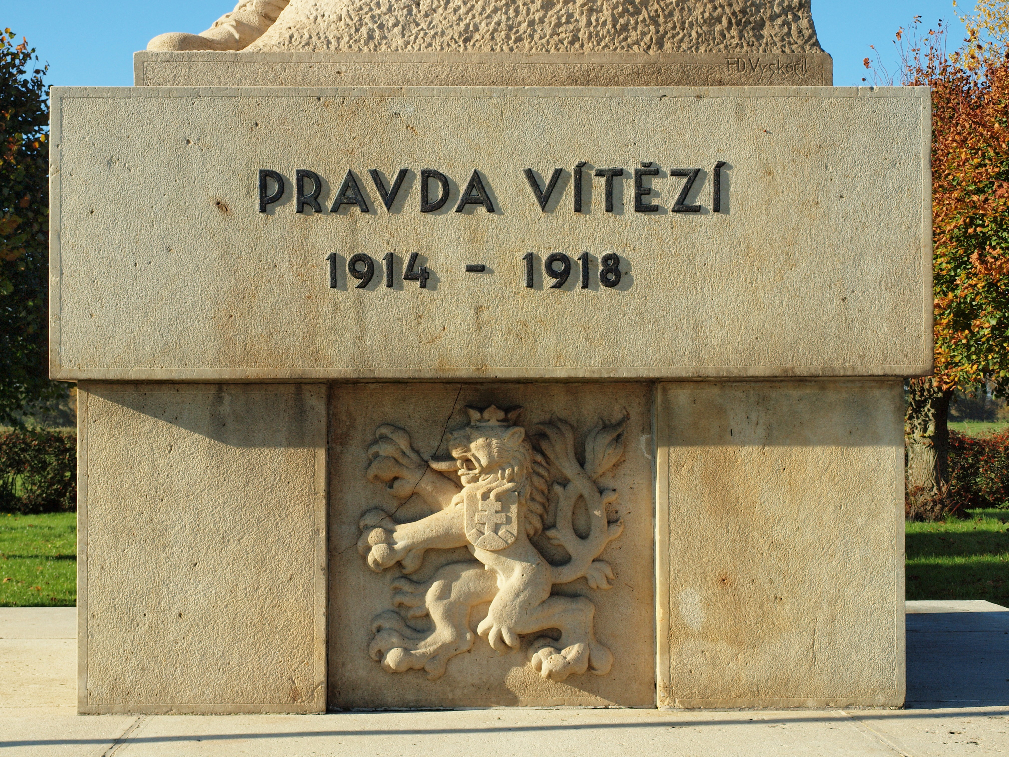 Monument de la Légion Tchécoslovaque à la Ferme de Bobot à Chestres (Vouziers, Ardennes, France)